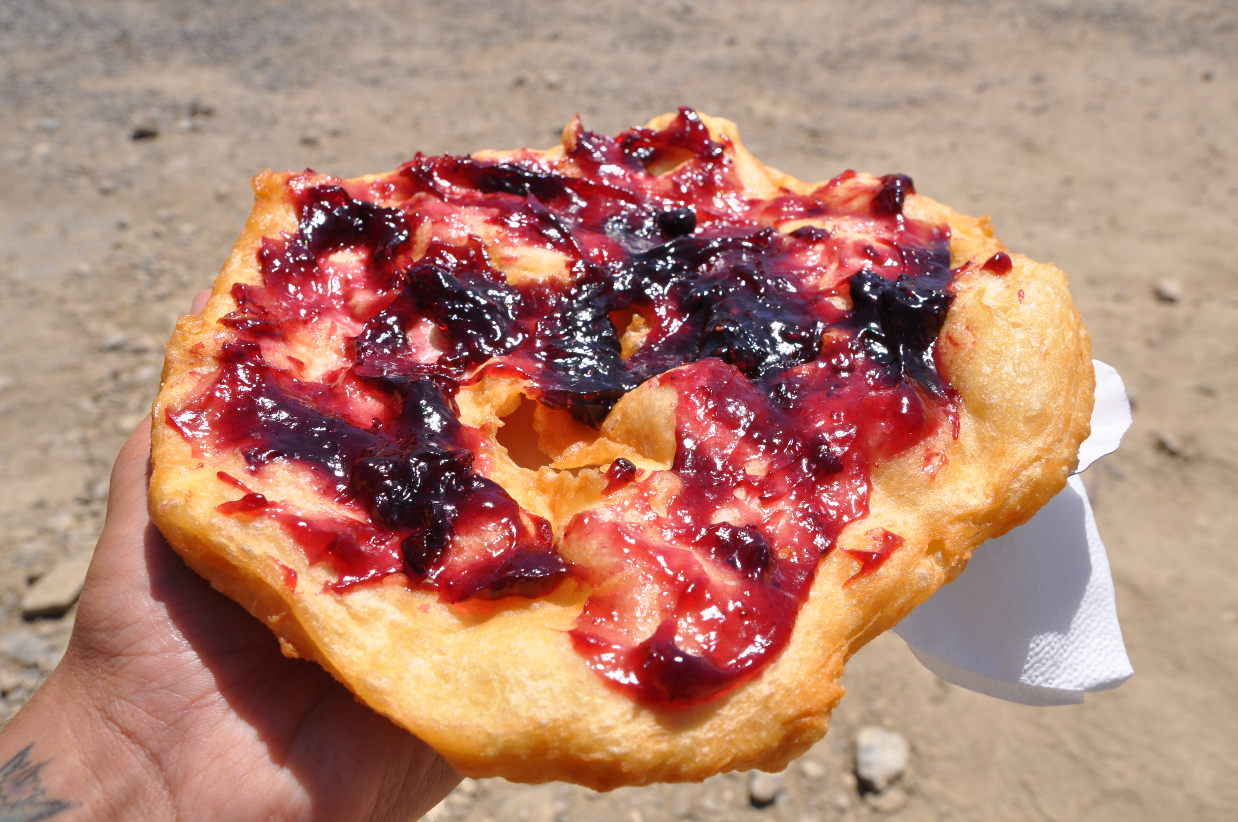 Erdély, Csíkszereda, lekváros lángos